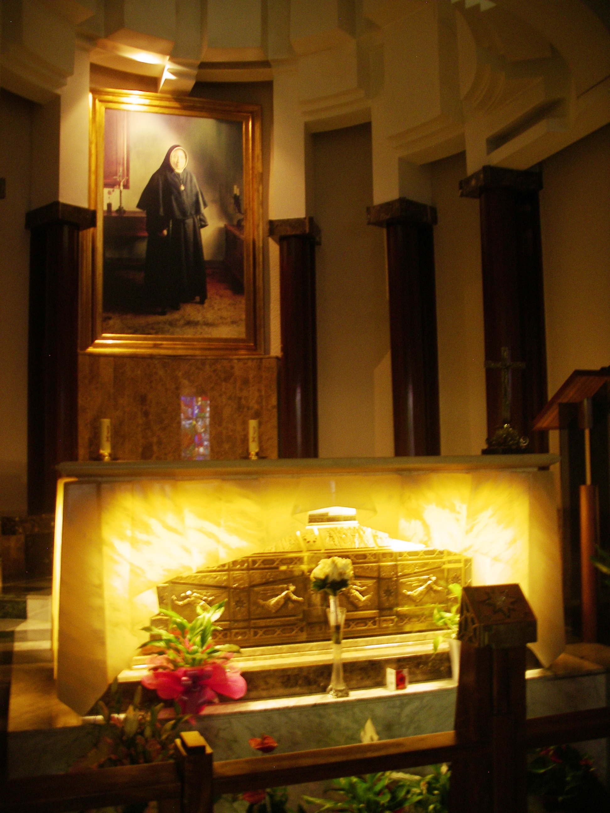 Sepulcre de Santa Genoveva Torres, a la capella de la Residencia del Pilar (Saragossa), casa general de les Germanes del Sagrat Cor i dels Àngels.